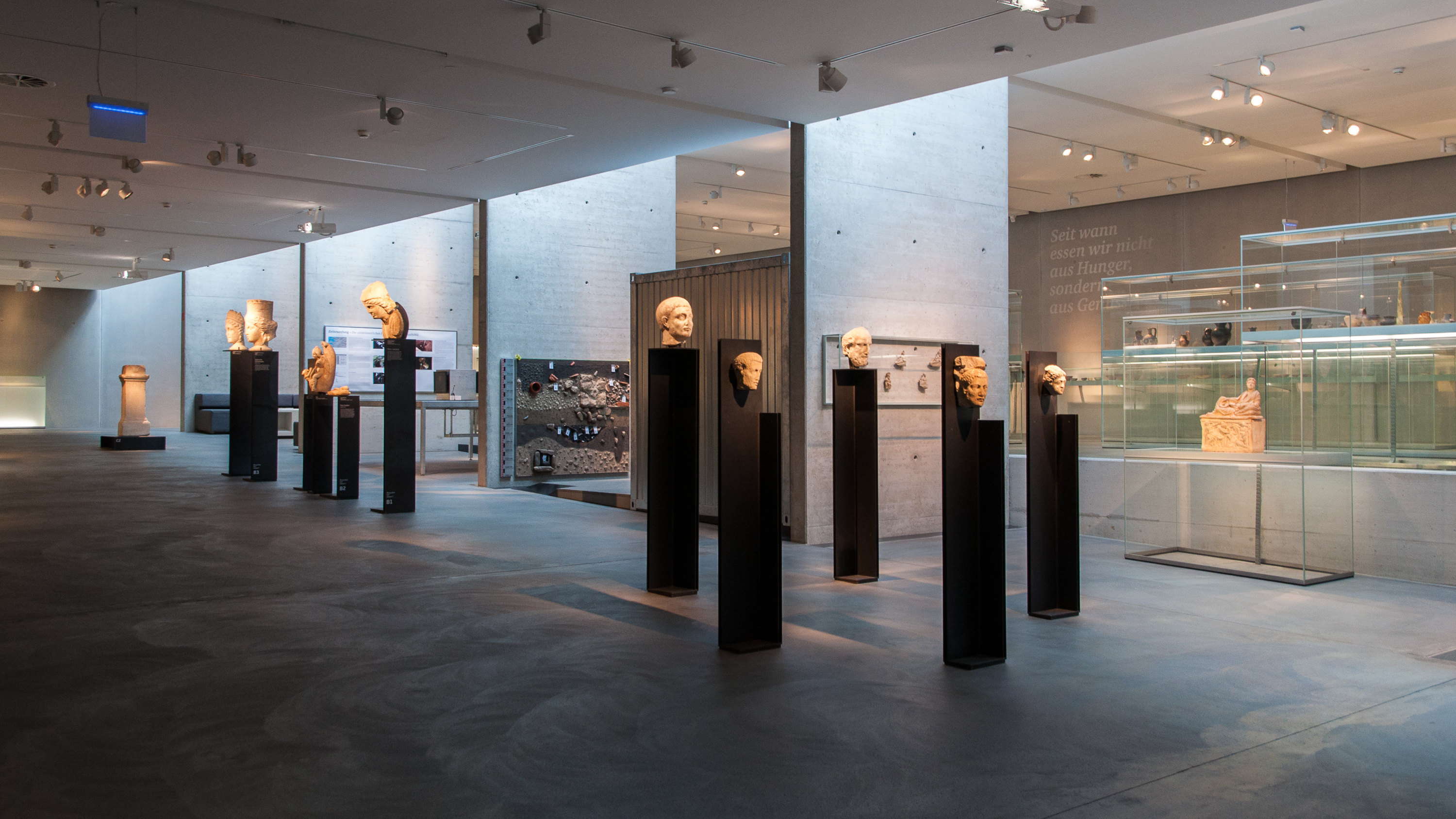 Archäologiemuseum des Universalmuseums Joanneum im Schlosspark von Schloss Eggenberg, Graz, Österreich.